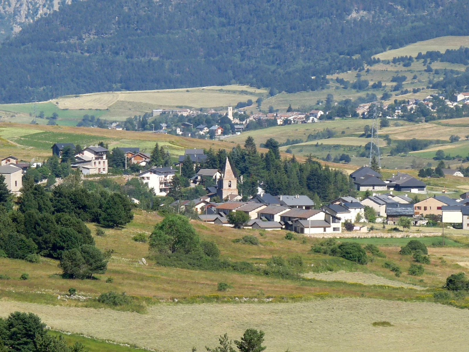 Vue de Bolquère depuis Font-Romeu, Pyrénées-Orientales, France